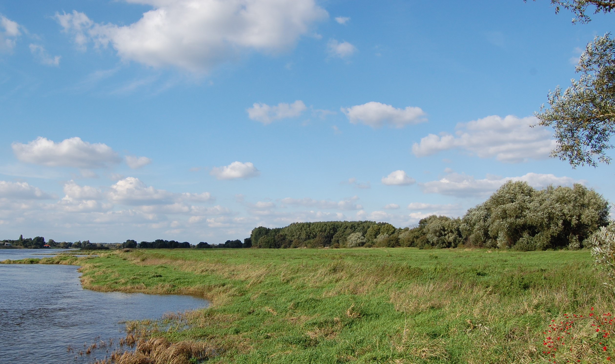 Blick vom östlichen Fähranleger der Fähre Westerhüsen nach Norden zum Holzwerder; Bereich im LSG „Mittelelbe/Mittlere Elbe“